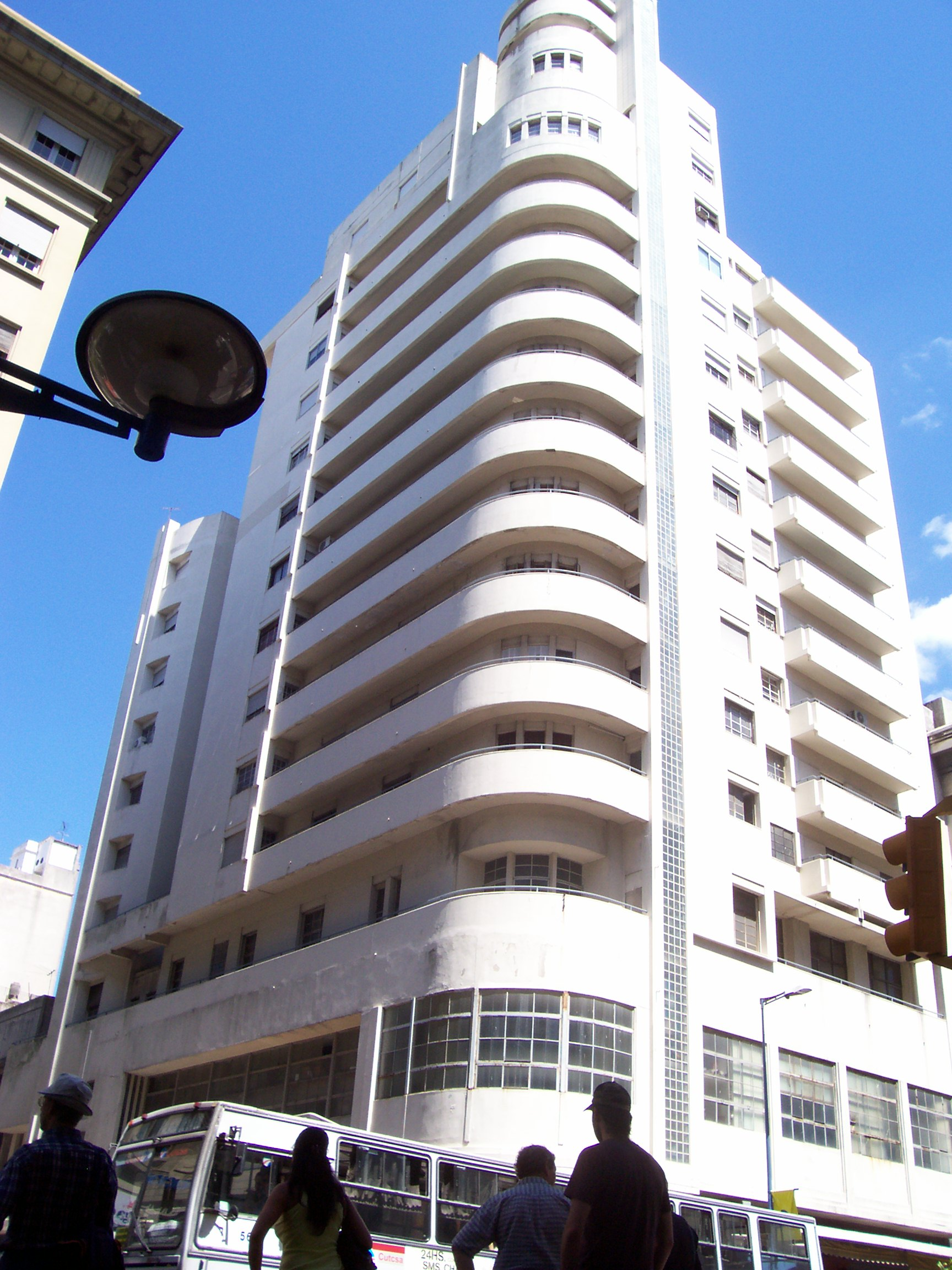 Palacio Lapido, edificio montevideano, sede del hoy desaparecido diario "Tribuna Popular"